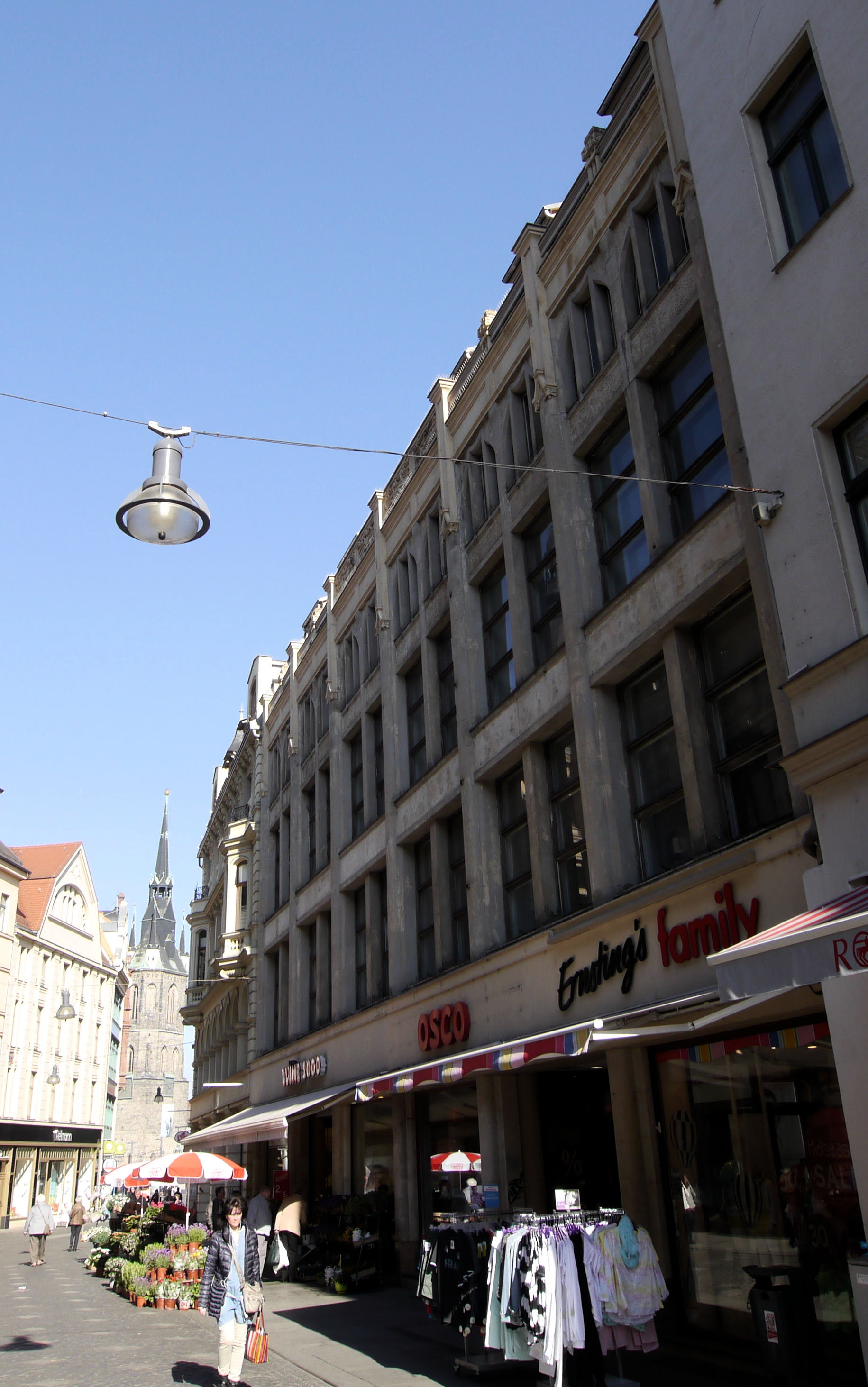 Leipziger Strasse in Halle (Saale) mit Blick auf den Marktplatz